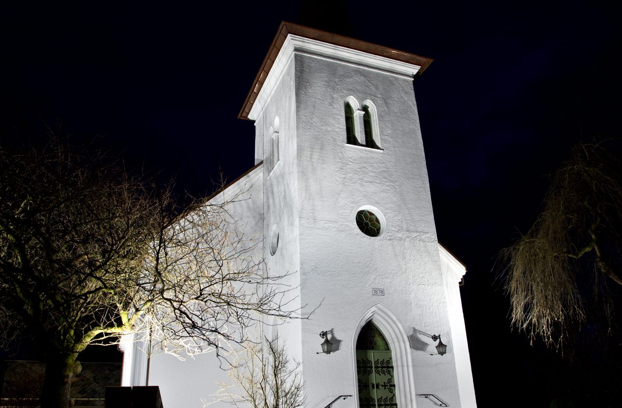 Birkeland kirke på Nesttun i Bergen, Norge